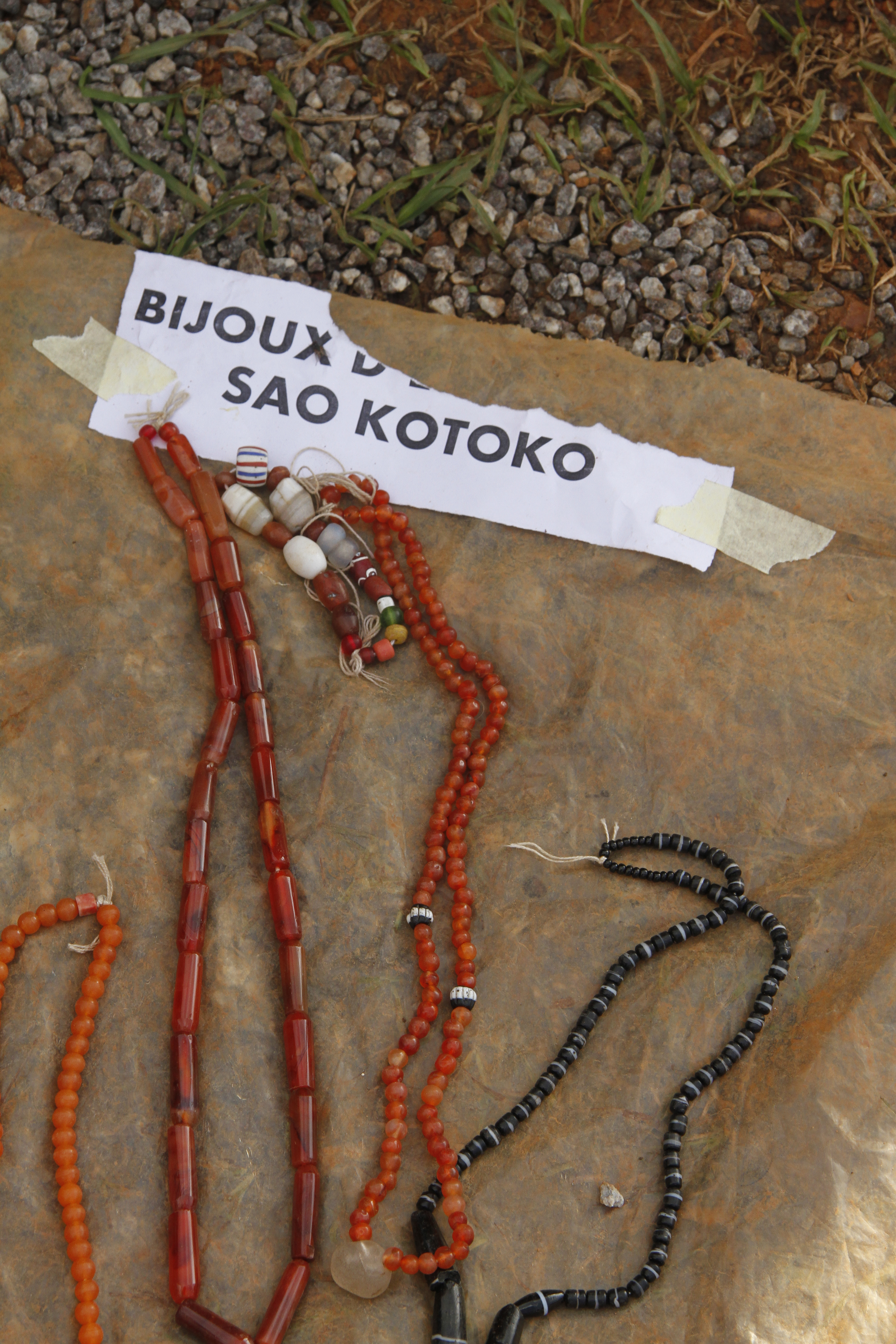 Accessoire de danse du nord du Cameroun sur scène lors du Fenac (Festival National des Arts et la Culture) Yaoundé au Cameroun This is an image from Cameroon